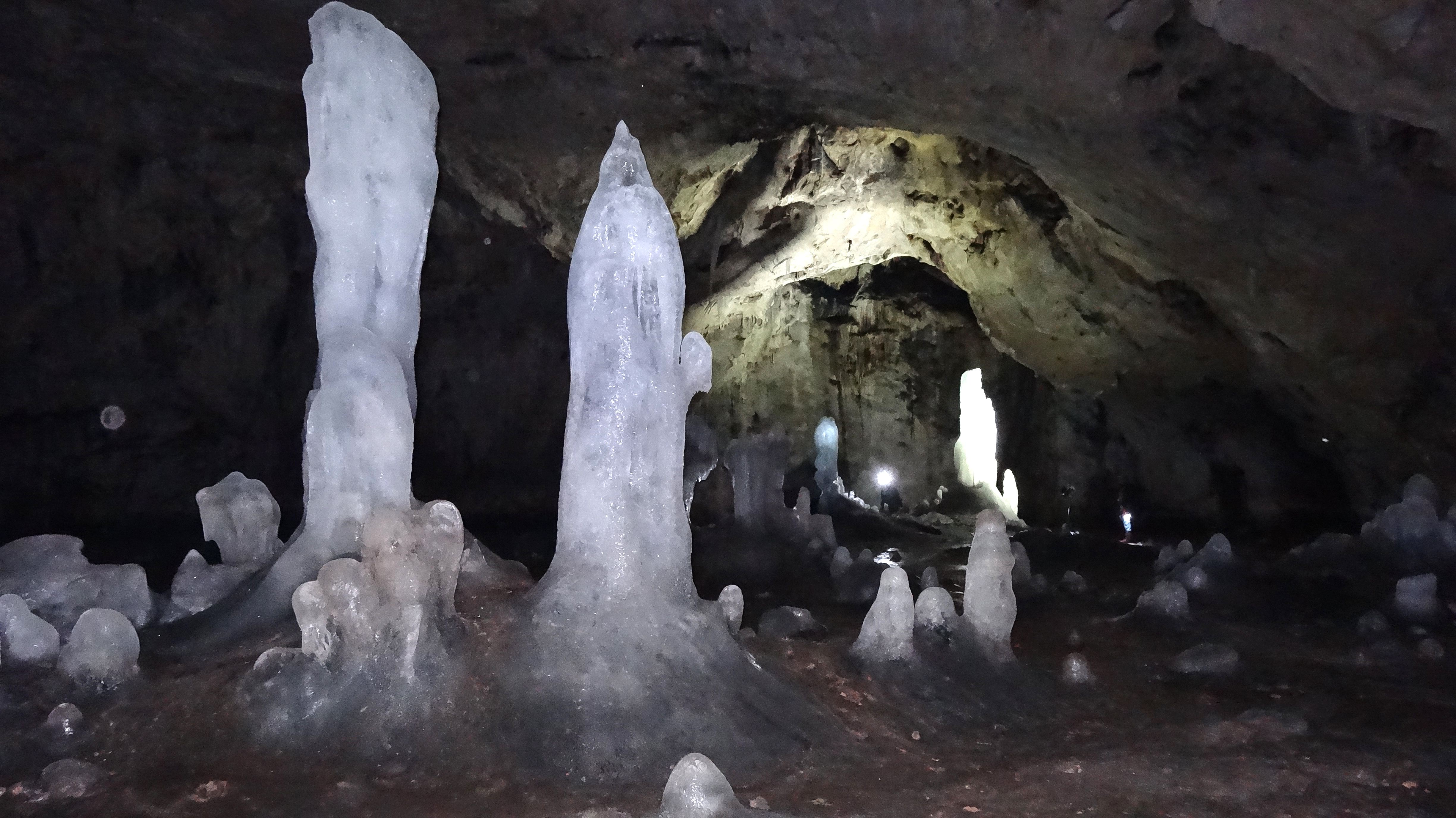 Аскынская ледяная пещера, Архангельский район This image is related to the protected area of Russia number 0210025